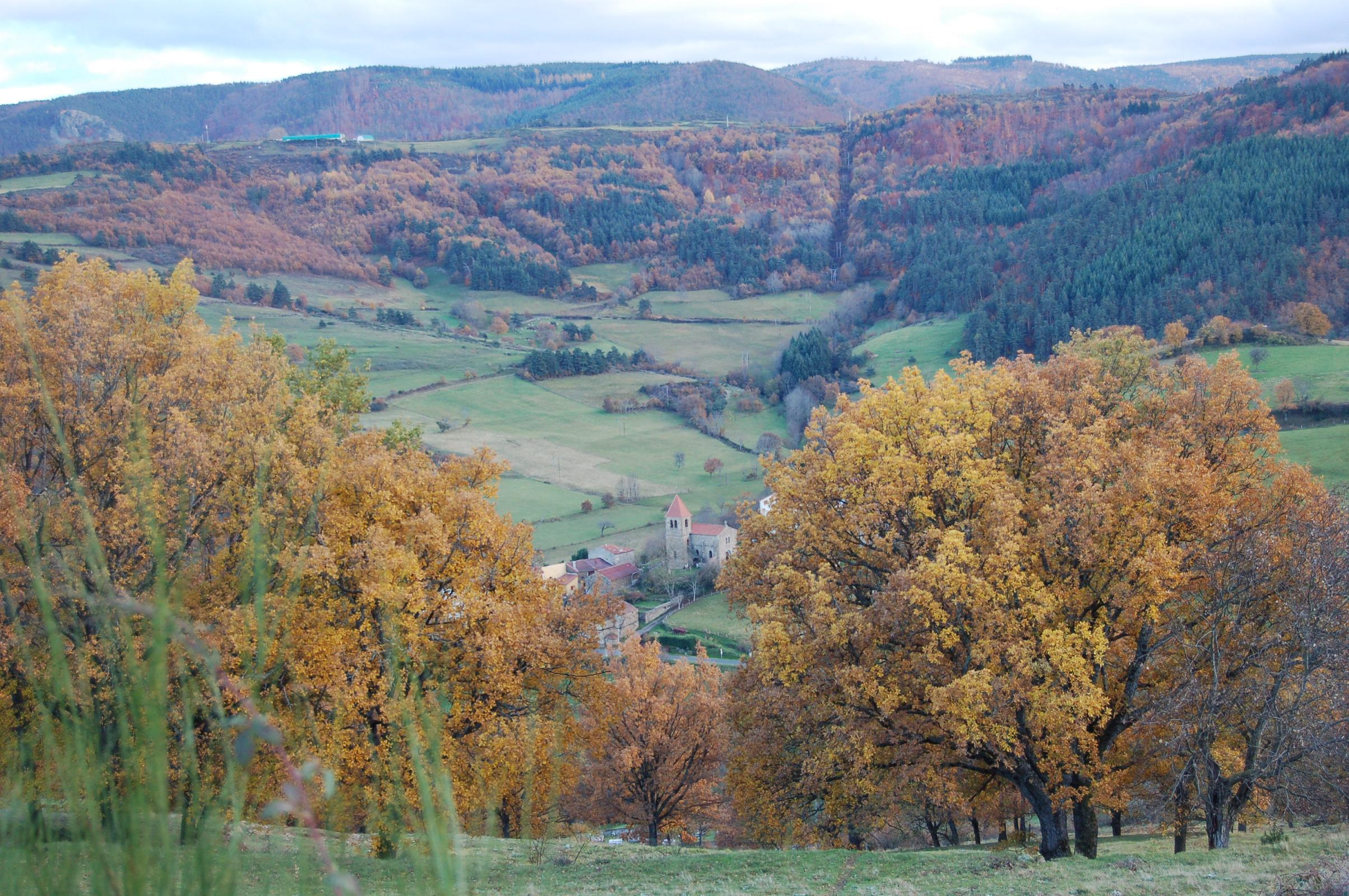 Vue de l'église de Saint-Austremoine - Eclairage fin Automne - Le village est au centre d'un cuvette (bas de la vallée)